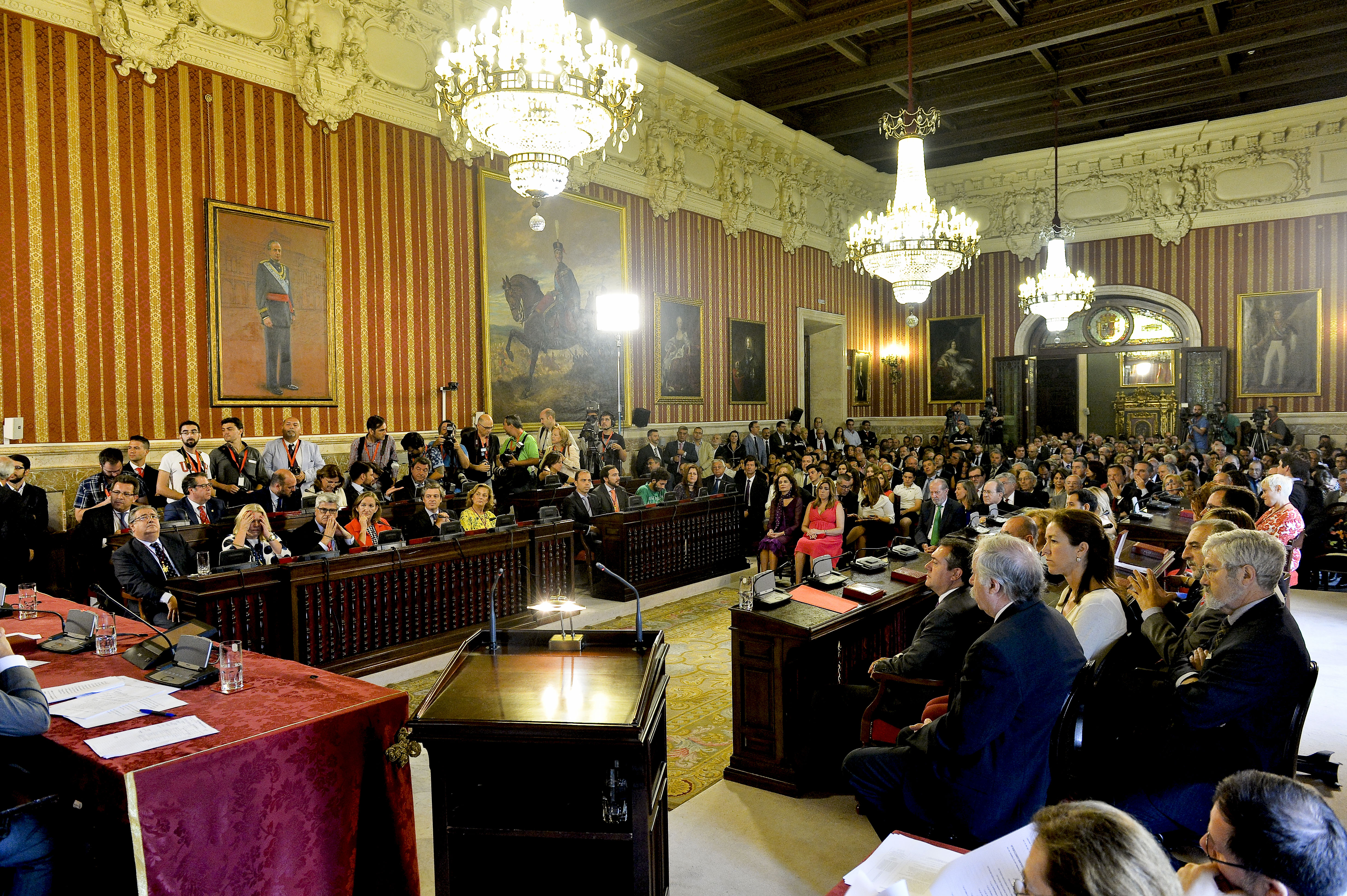 15.06.13-Toma-7- posesión Juan Espadas